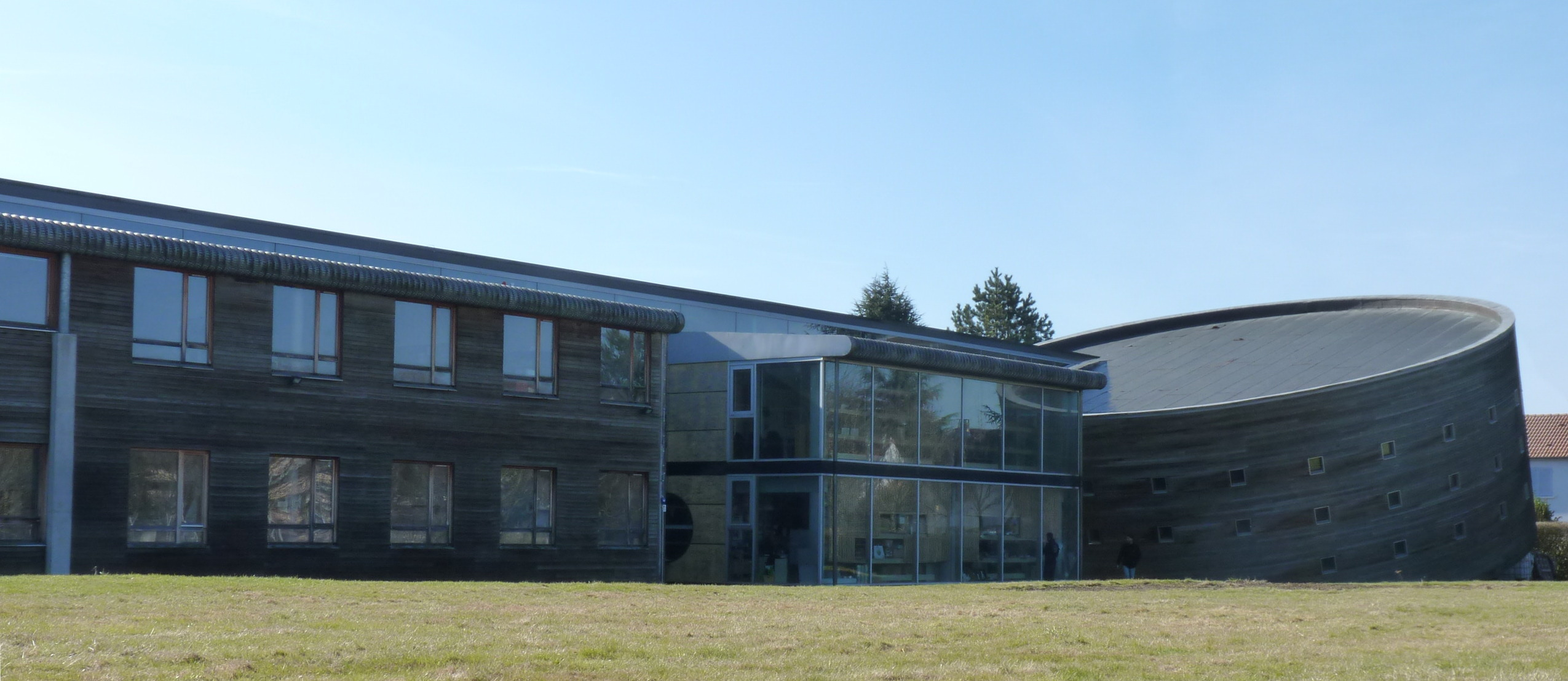 L'école ENSTIB et son grand amphi, façade nord (Épinal, département des Vosges, France)